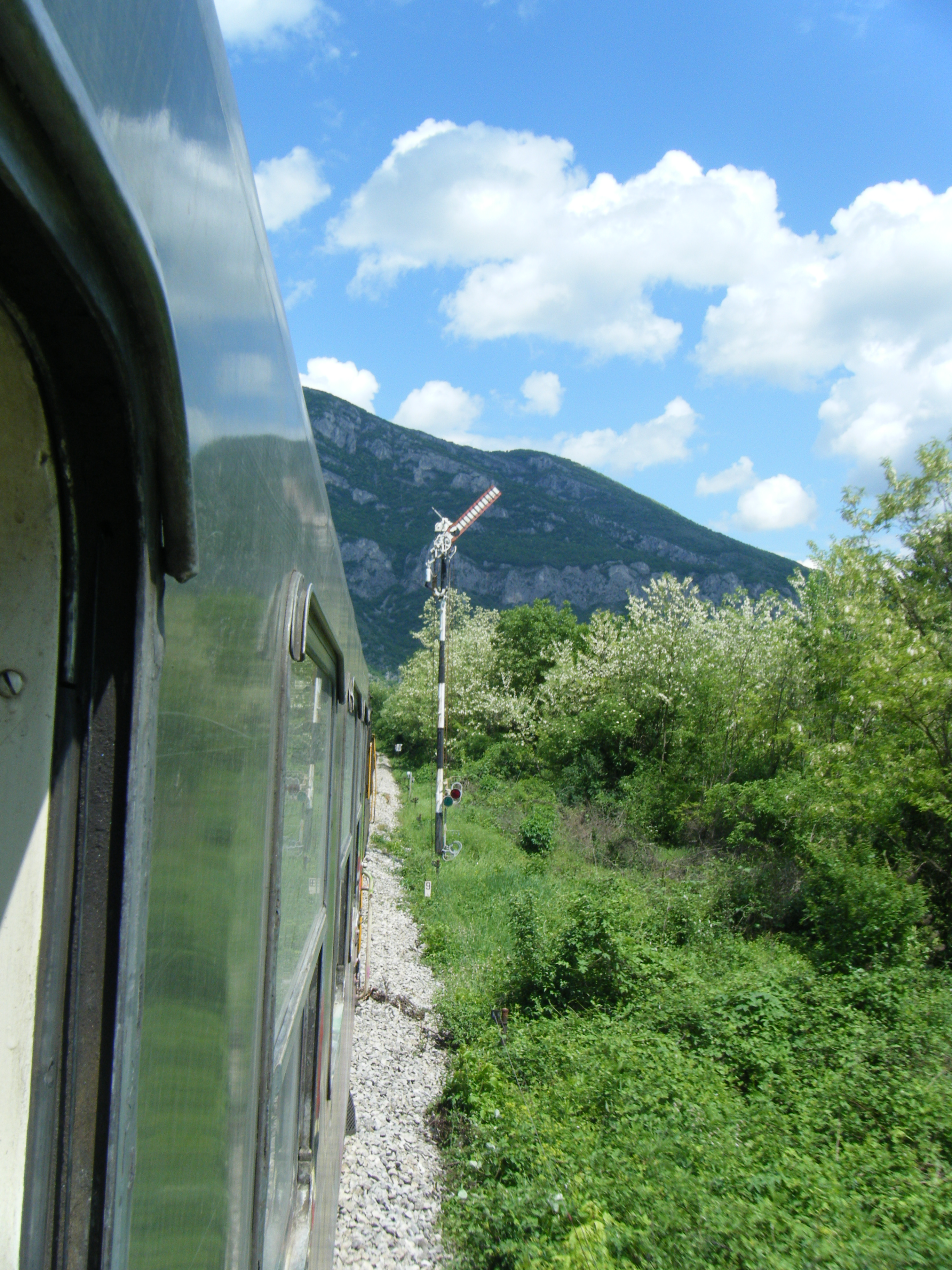 Fotografia che ritrae l'attuale sistema di segnalamento sulla linea Niš–Dimitrovgrad. Nella parte inferiore dell'immagine si scorgono i cavi metallici per la trasmissione del movimento